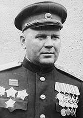 Георгий Фёдорович Захаров (1897 — 1957) — советский военачальник